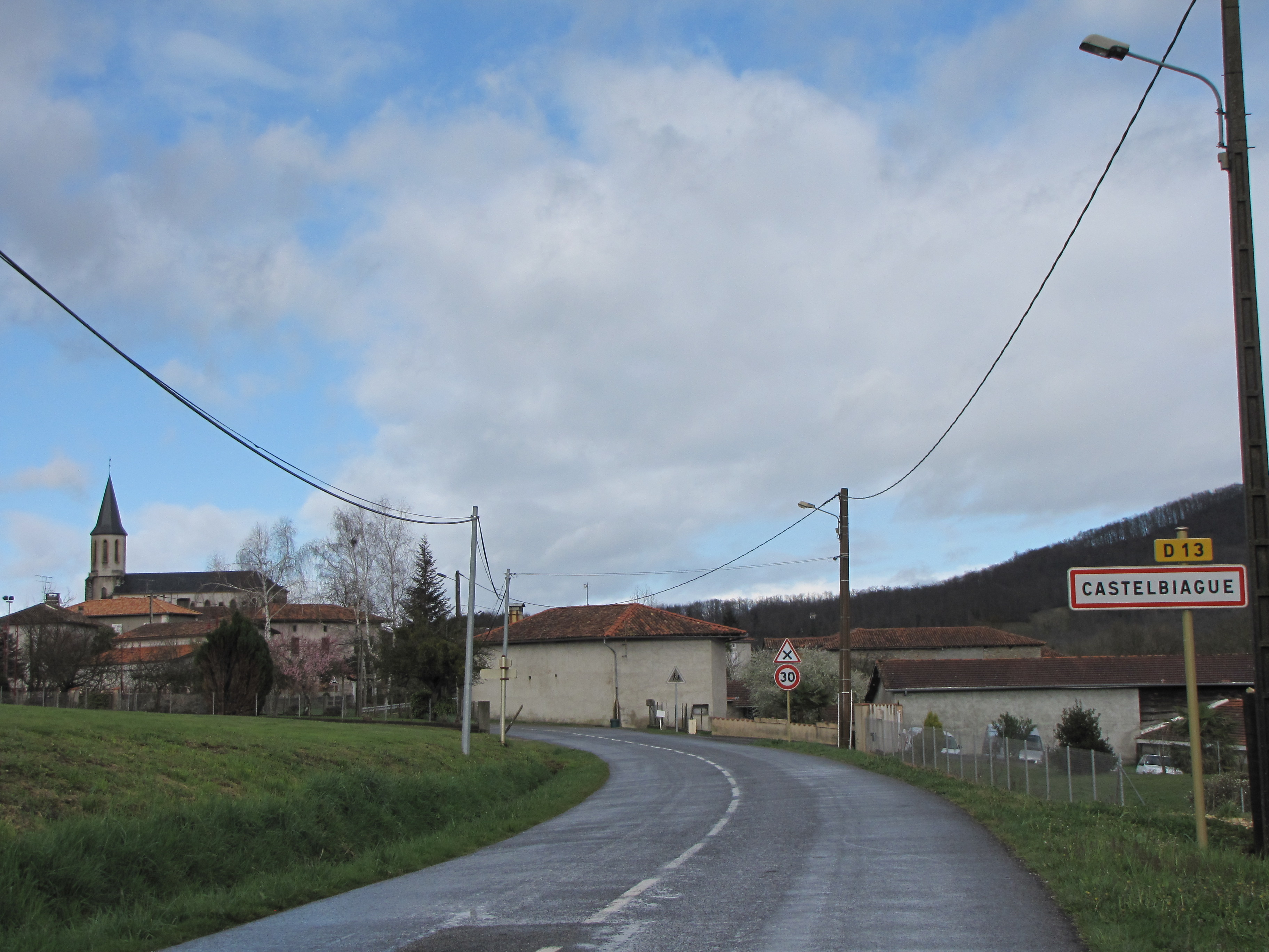 Castelbiague